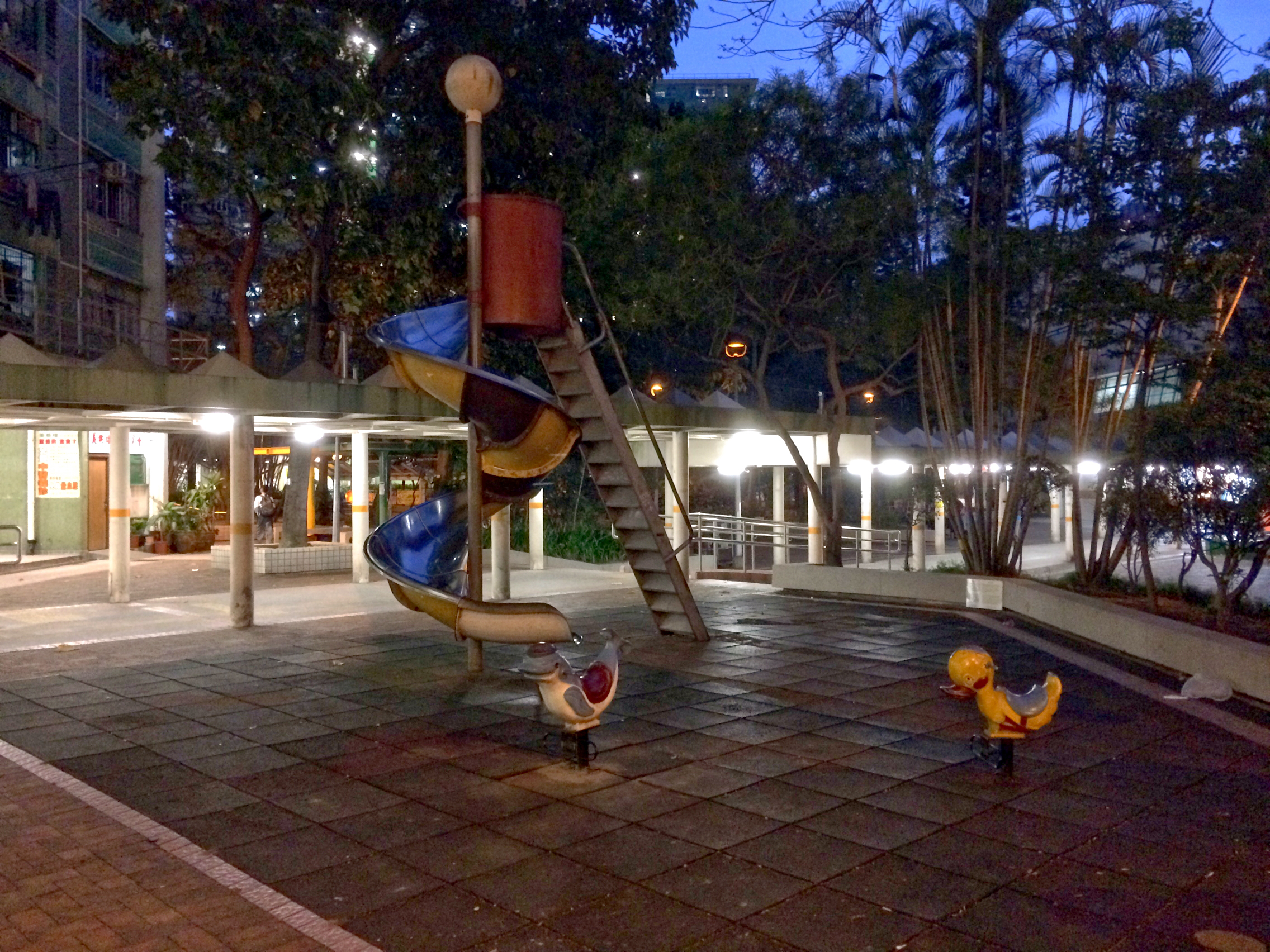 Mei Lam Estate 1980s slide